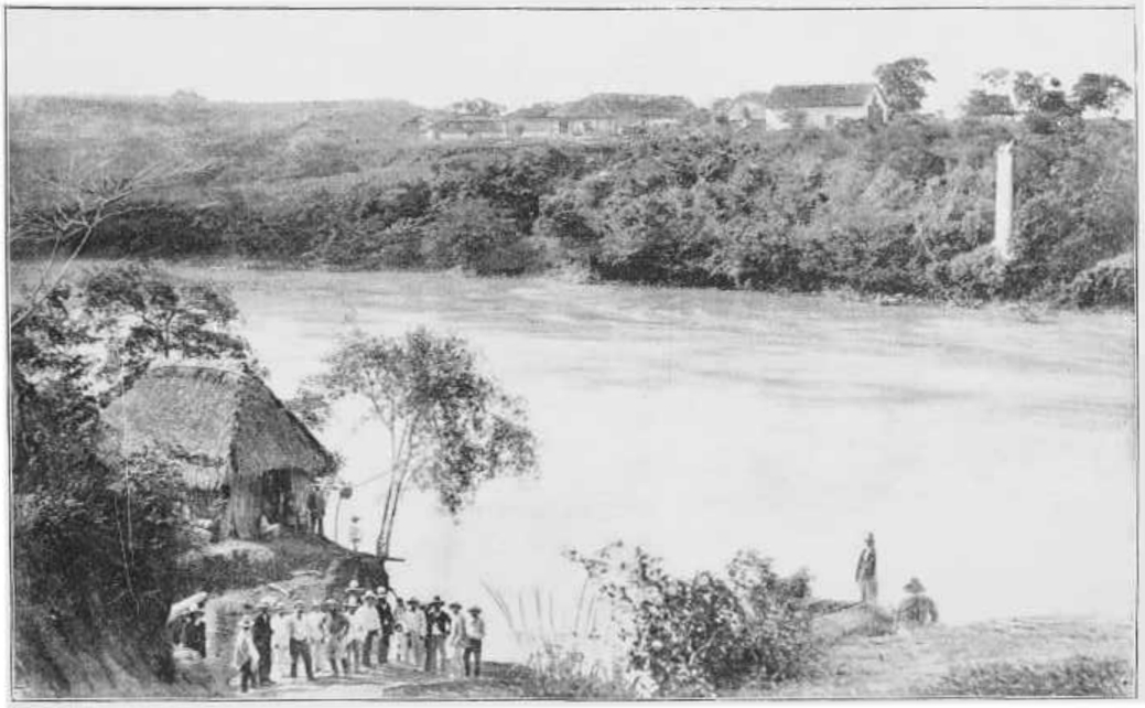 Le rio Magdalena à Girardot, Cundinamarca, Colombie